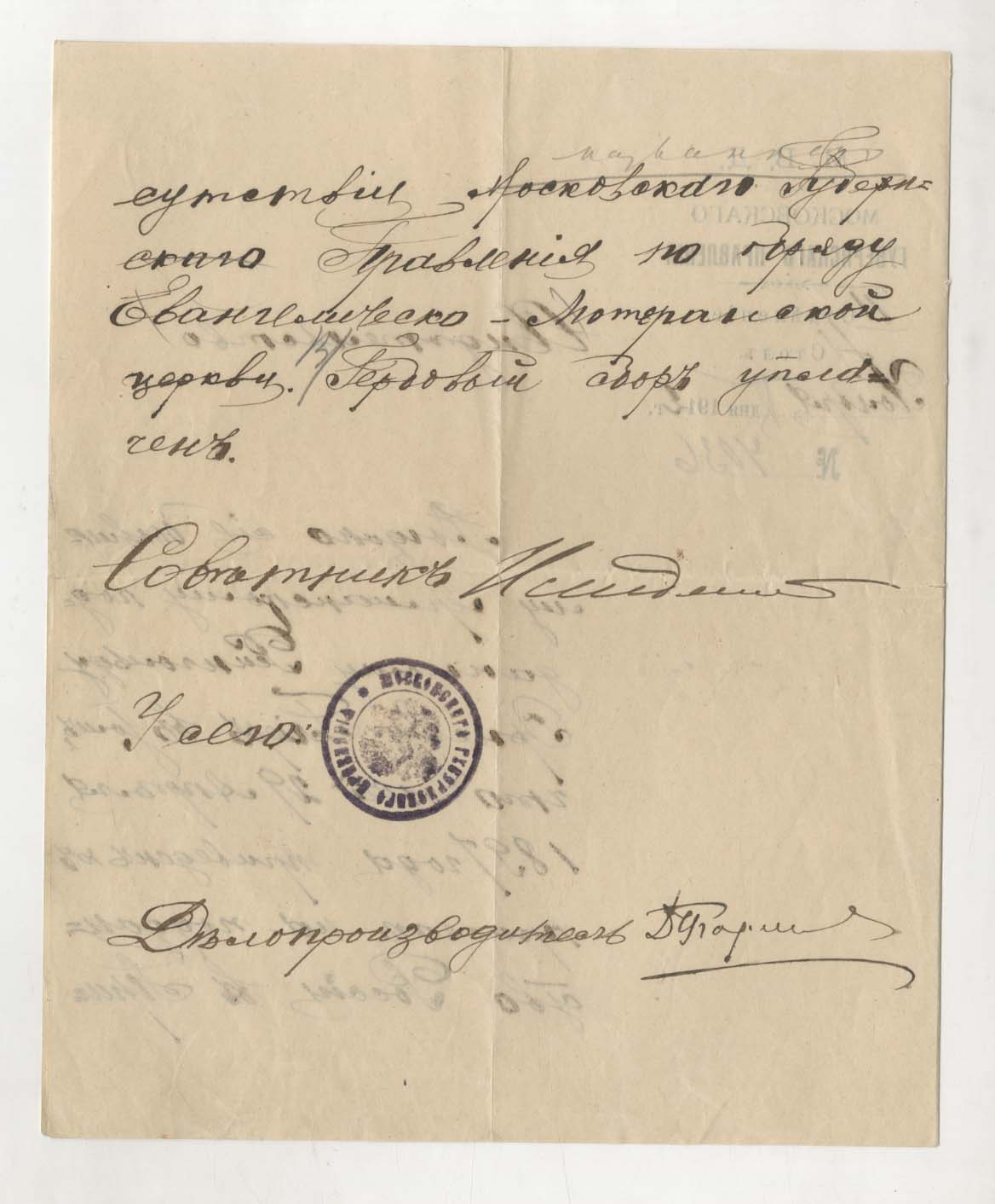 2-я страница Свидетельства о приведении Р. М. Глиэра к присяге на подданство России от 29 апреля (ст. ст.) 1897 года